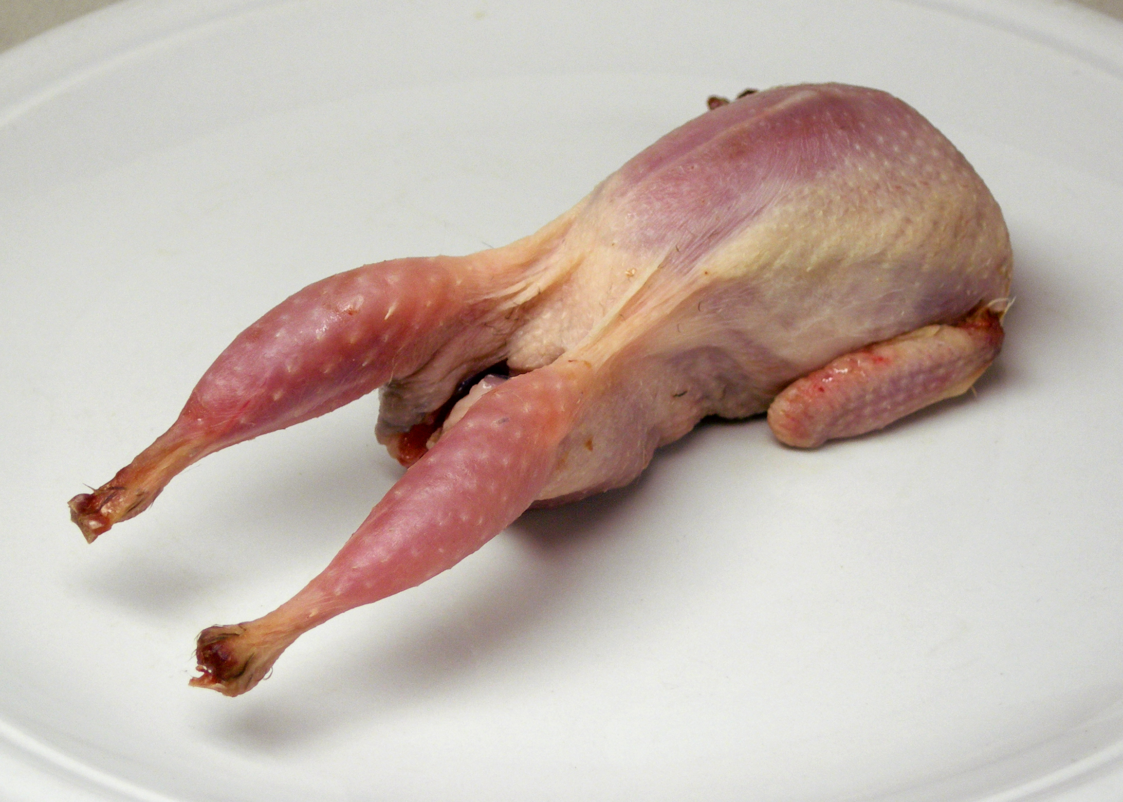 Ausgenommene rohe Wachtel